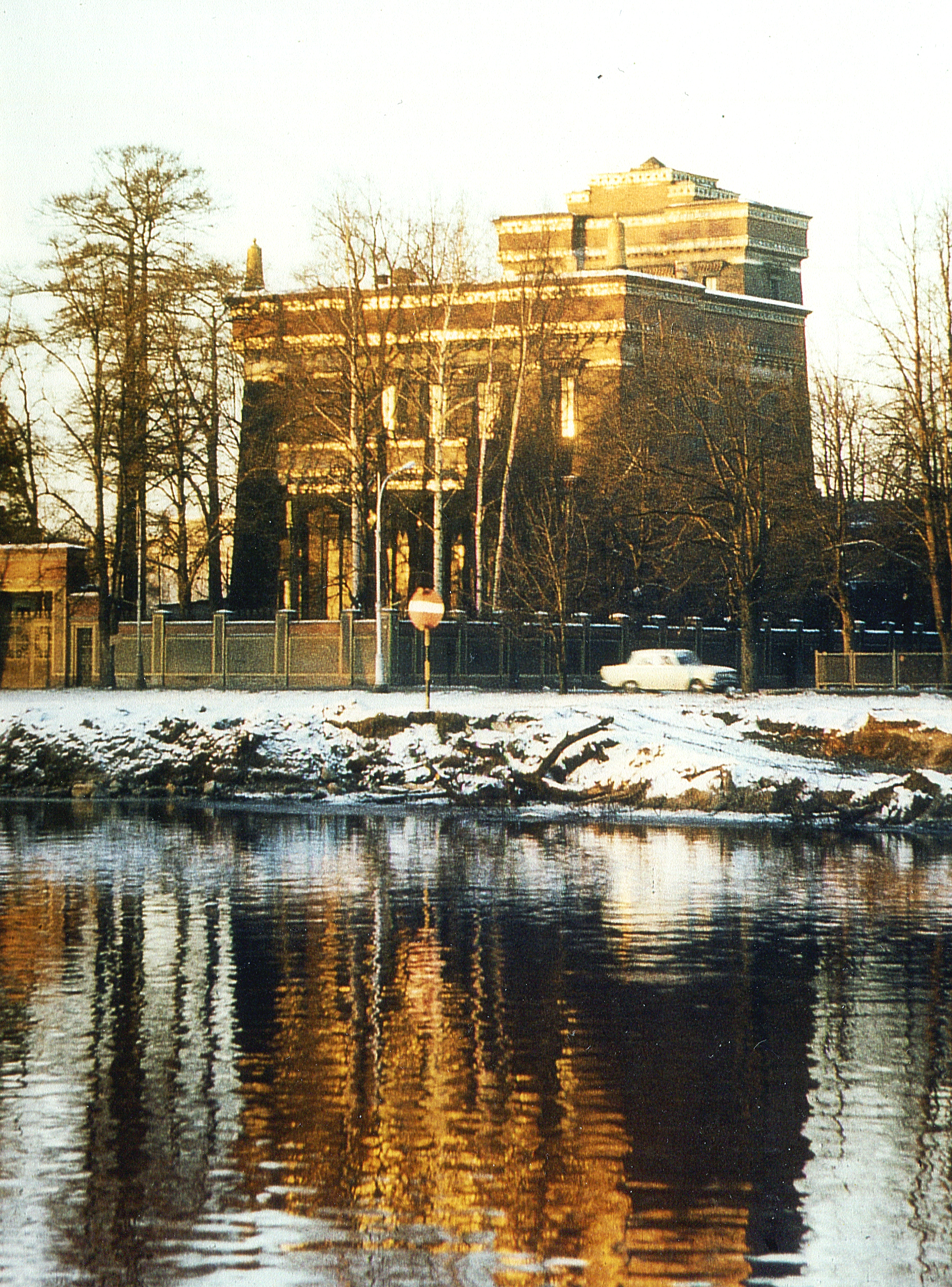 Буддистский храм